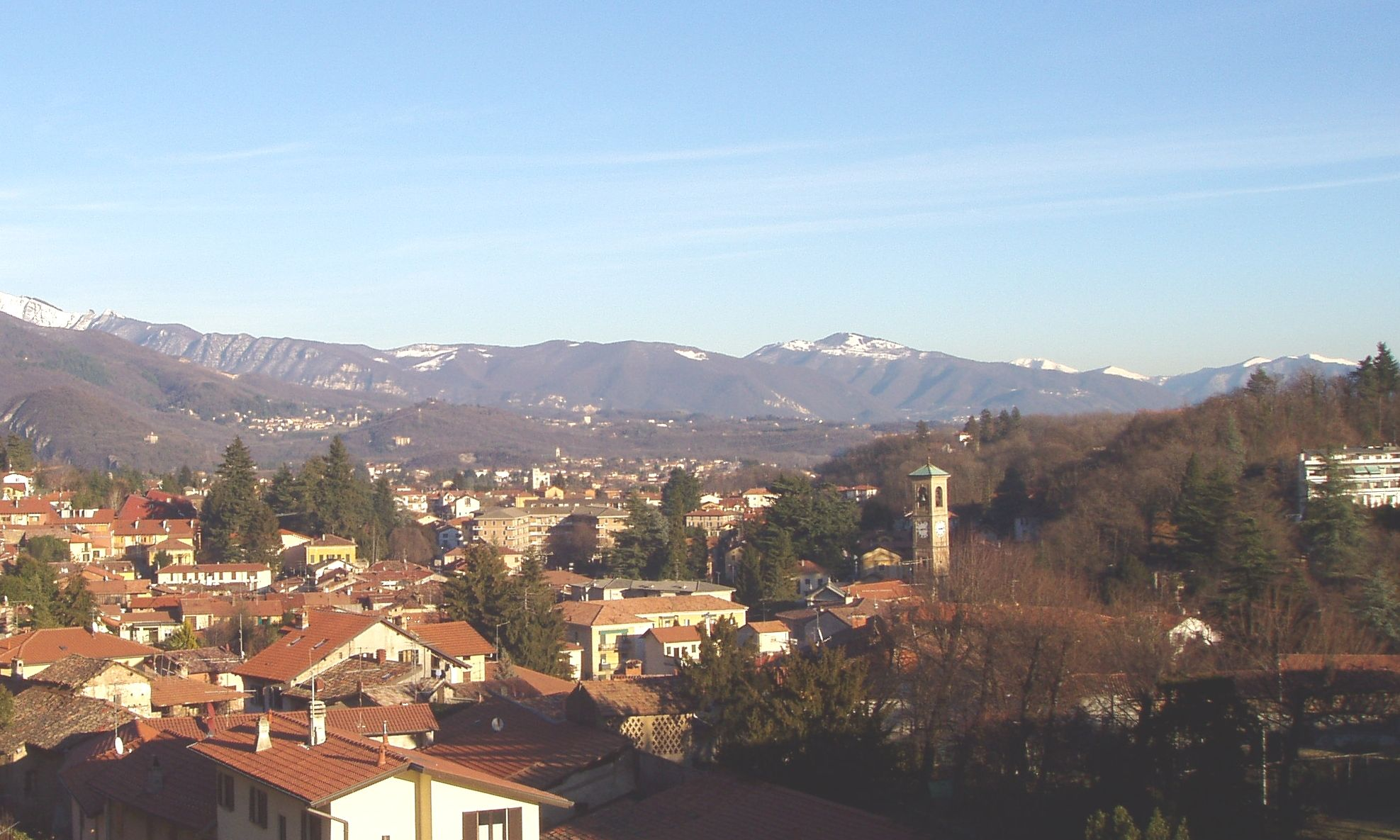 Visione panoramica del centro storico di Induno Olona (VA) (Italia)